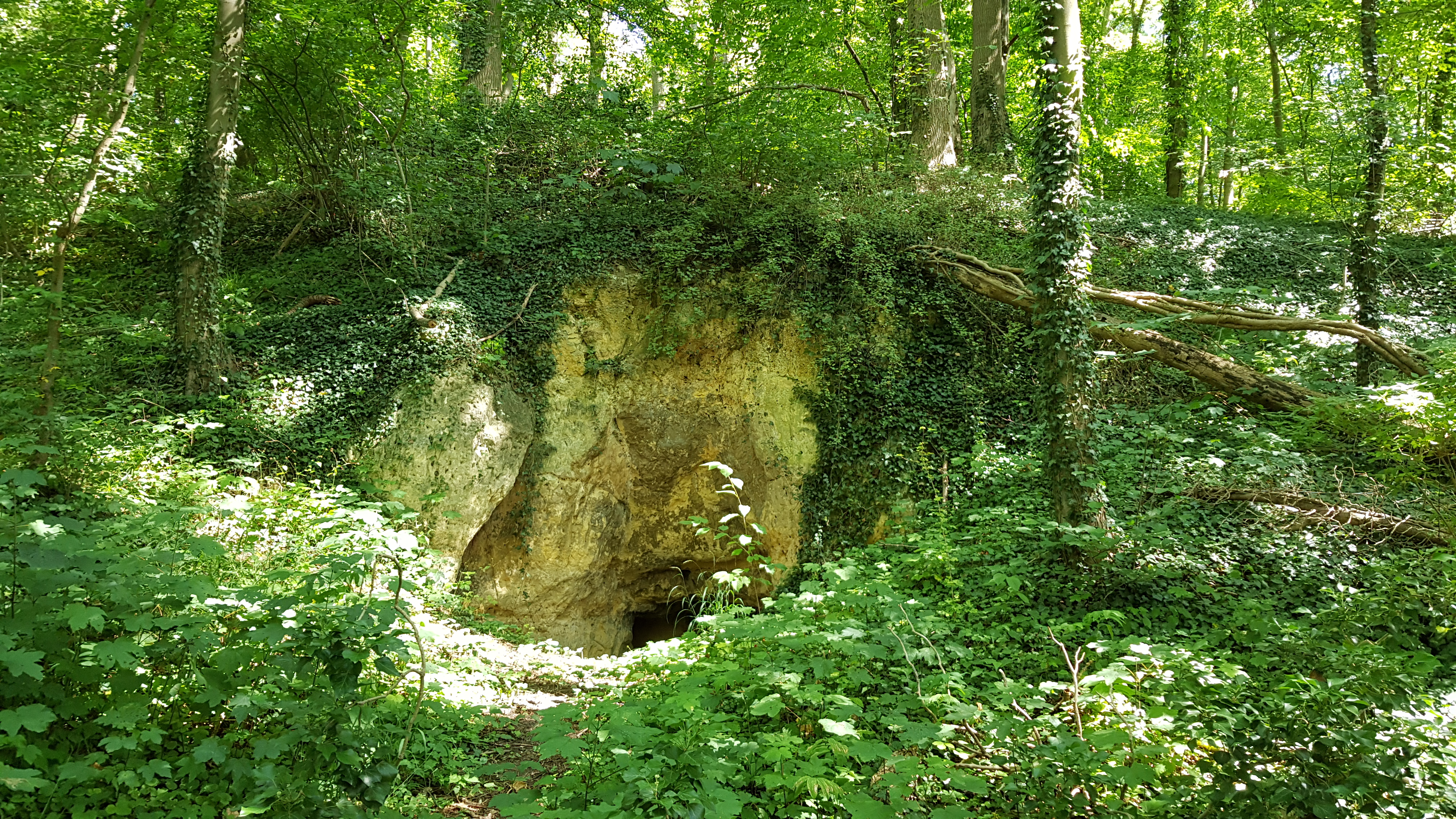 Bemelerbosgroeve II, Bemelen, Nederland